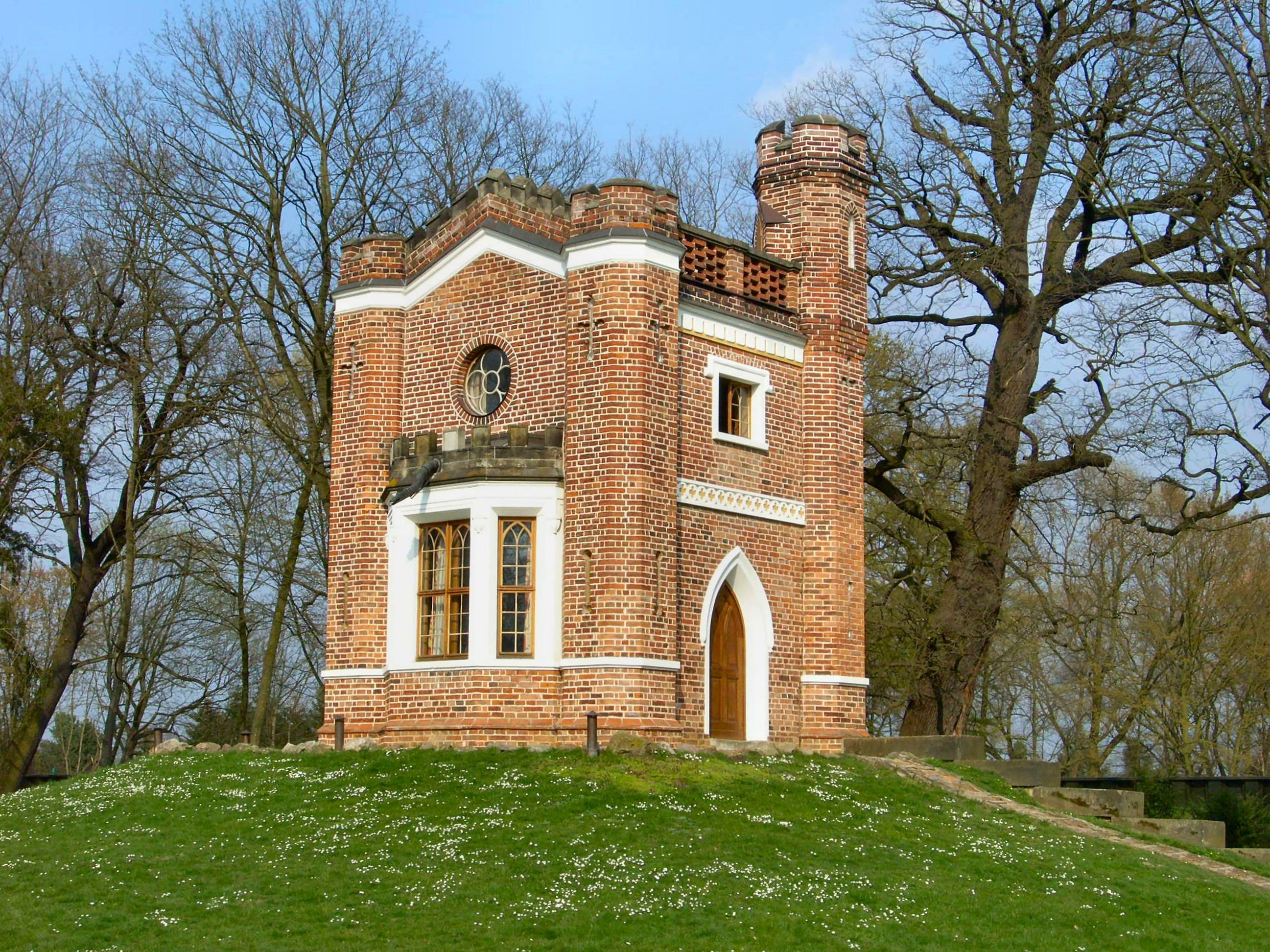 Luisium,neugotischerPavilion (Schlangenhaus)